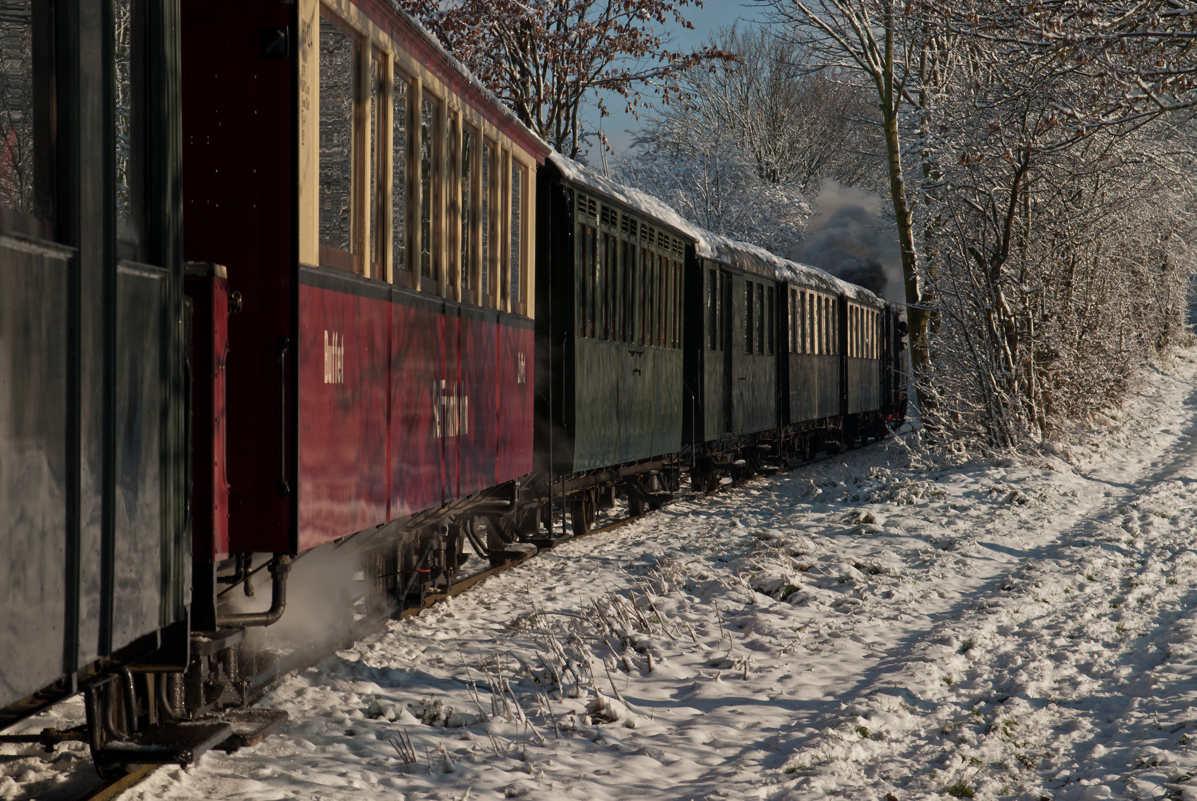 Zug der Selfkantbahn auf dem Brechpunkt der Steigung hinter dem Birgdener Sportplatz Fahrtrichtung Schierwaldenrath